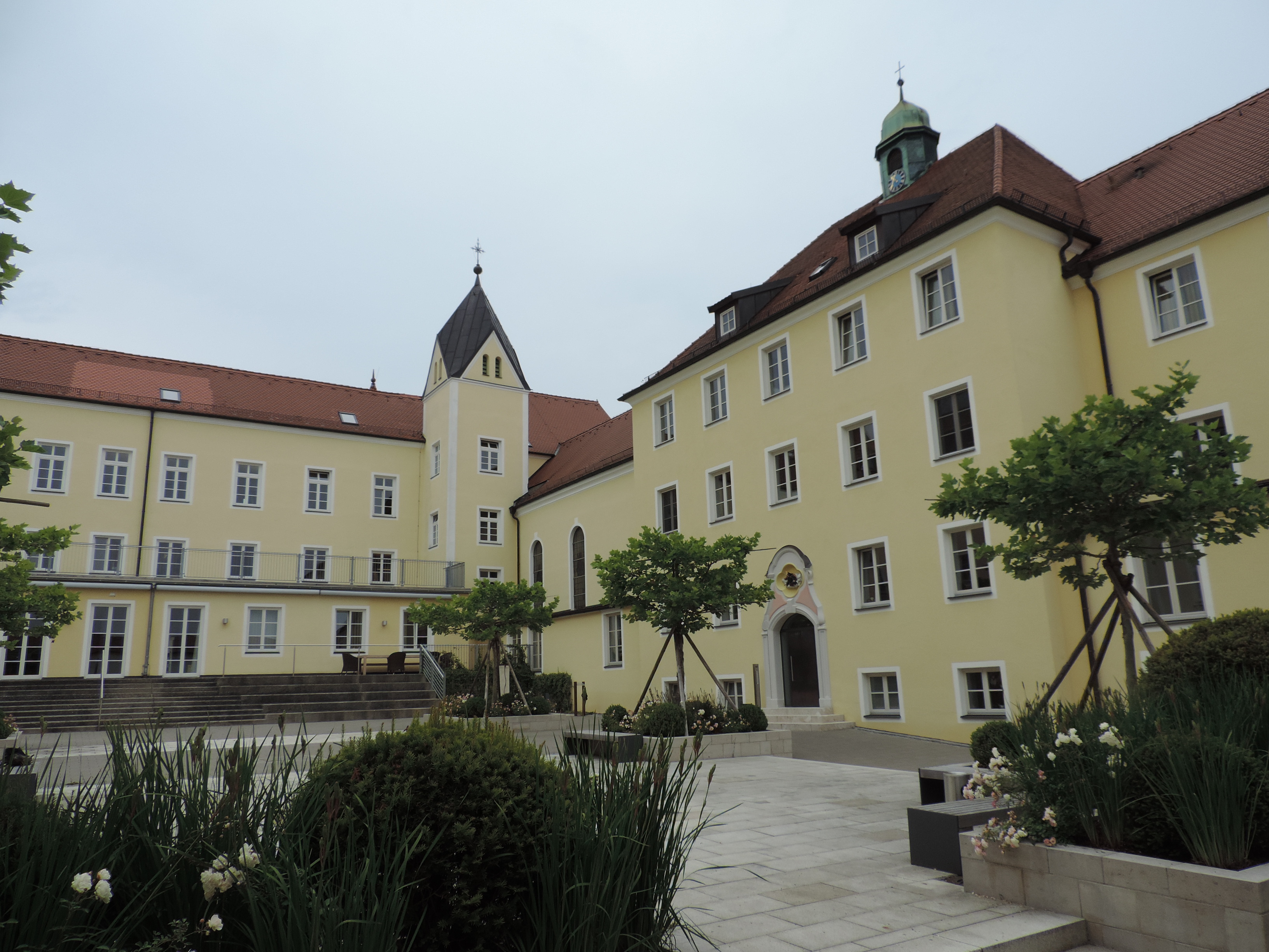 Ehemaliges Schloss Schweinspoint